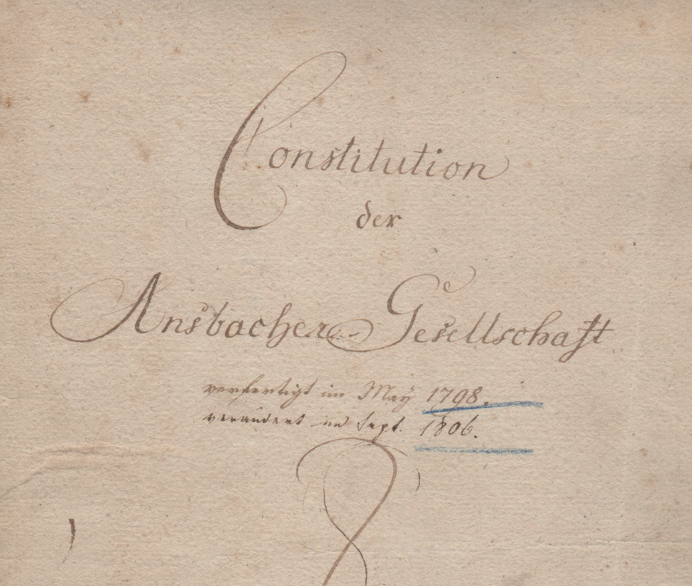 Constitution der Ansbacher-Gesellschaft, aus der das Corps Onoldia hervorging. Als zweifellos älteste Constitution eines studentischen Corps enthält sie erstmals alle wesentlichen Kriterien der späteren Kösener Corps.